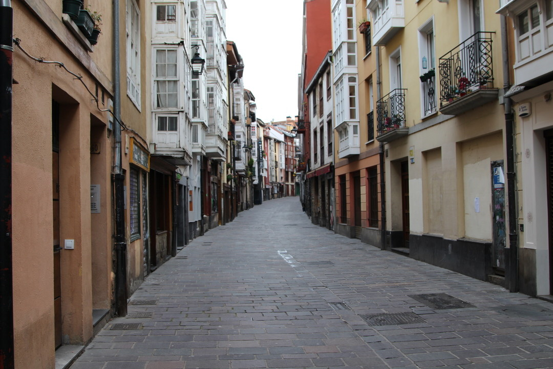 Gasteizko Aleak egindako argazki sorta, COVID-19aren eraginez hartutako neurriena. Argazki guztiak ikusgai helbidean.